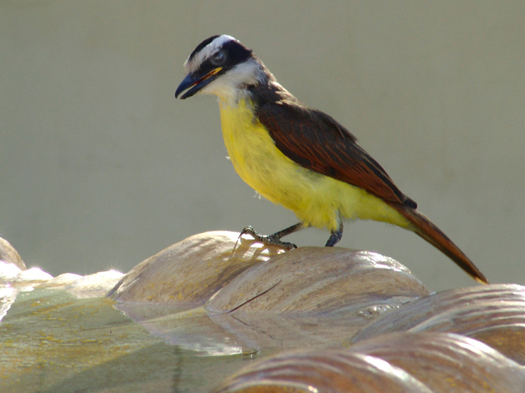 Pitangus sulphuratus in Avaré (Brazil)